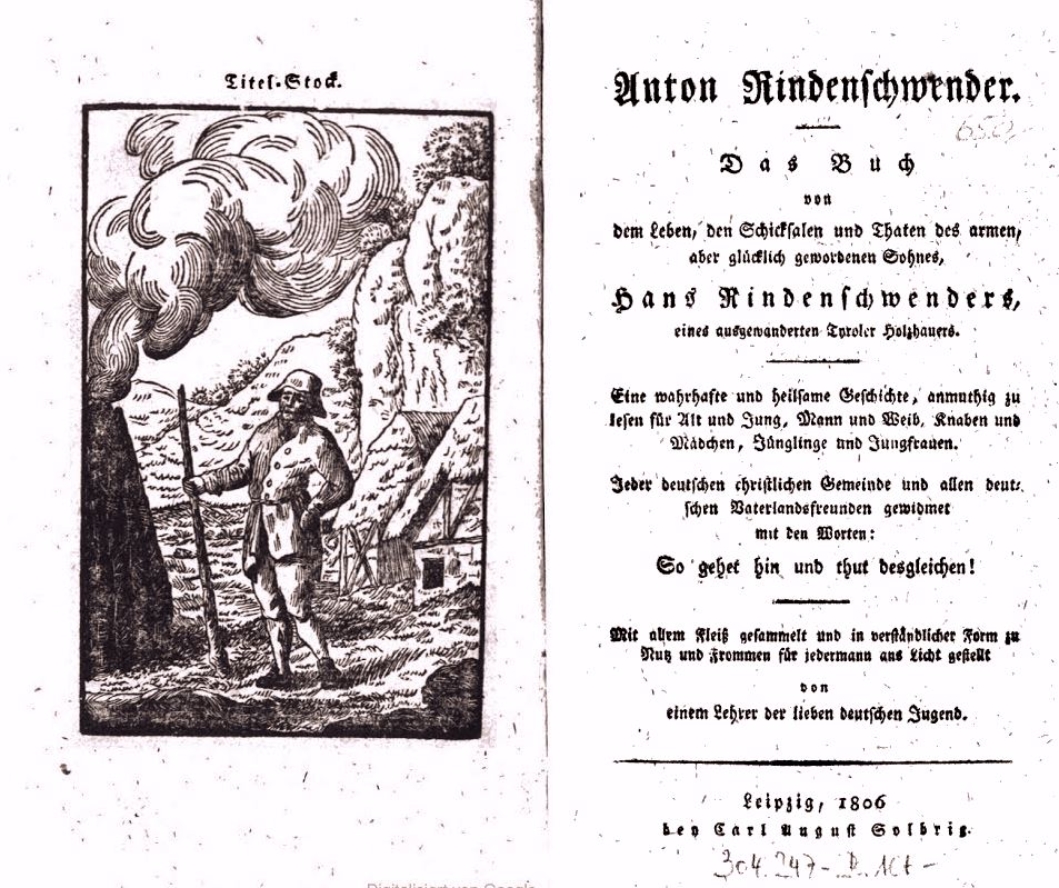 Buchtitel von einem Buch über Anton Rindenschwender von 1806